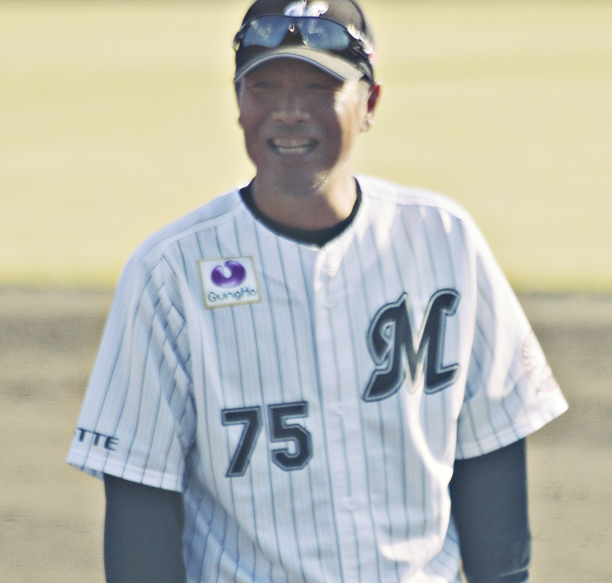 ロッテの堀幸一コーチ